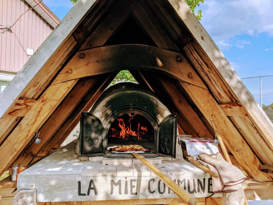 four a pain la mie commune construit en juillet 2019 avec l'aide des bénévoles